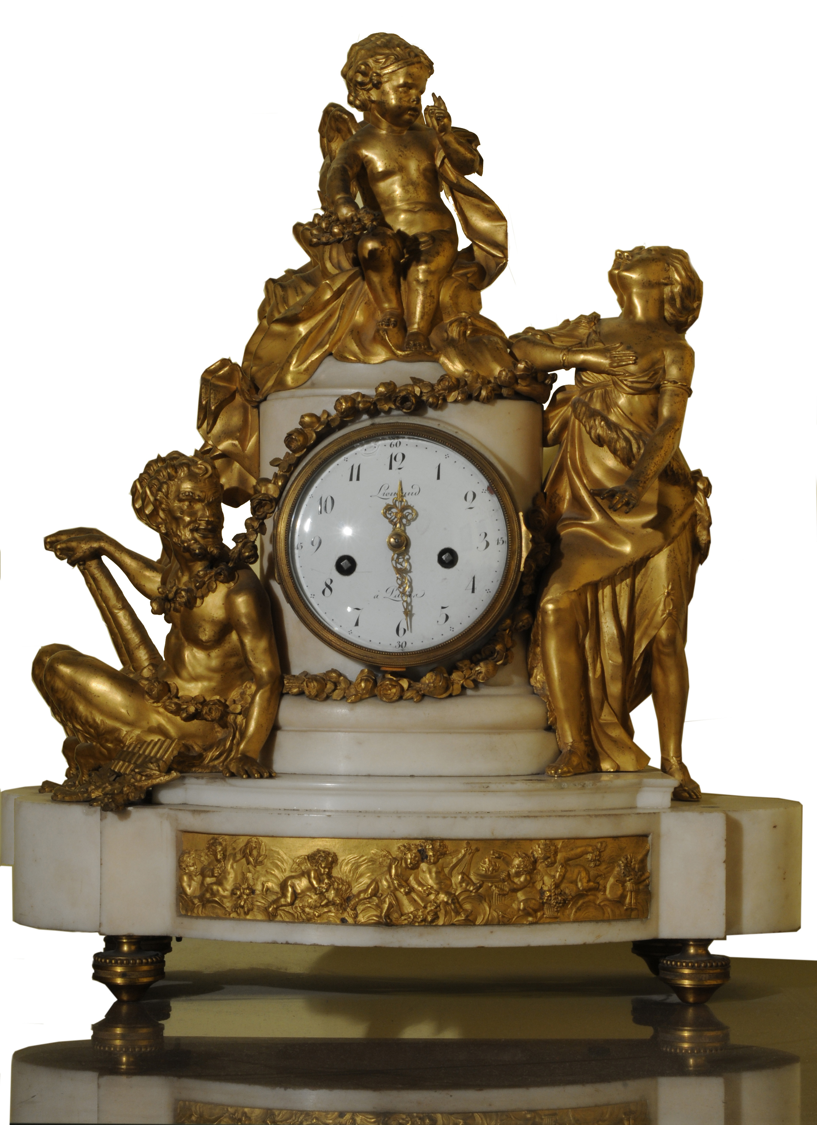 Balthazar Lieutaud, Reloj de mesa. 1760/1780. 52 x 24 x 41,7 cm, bronce, mármol, metal. Inv. 7780.